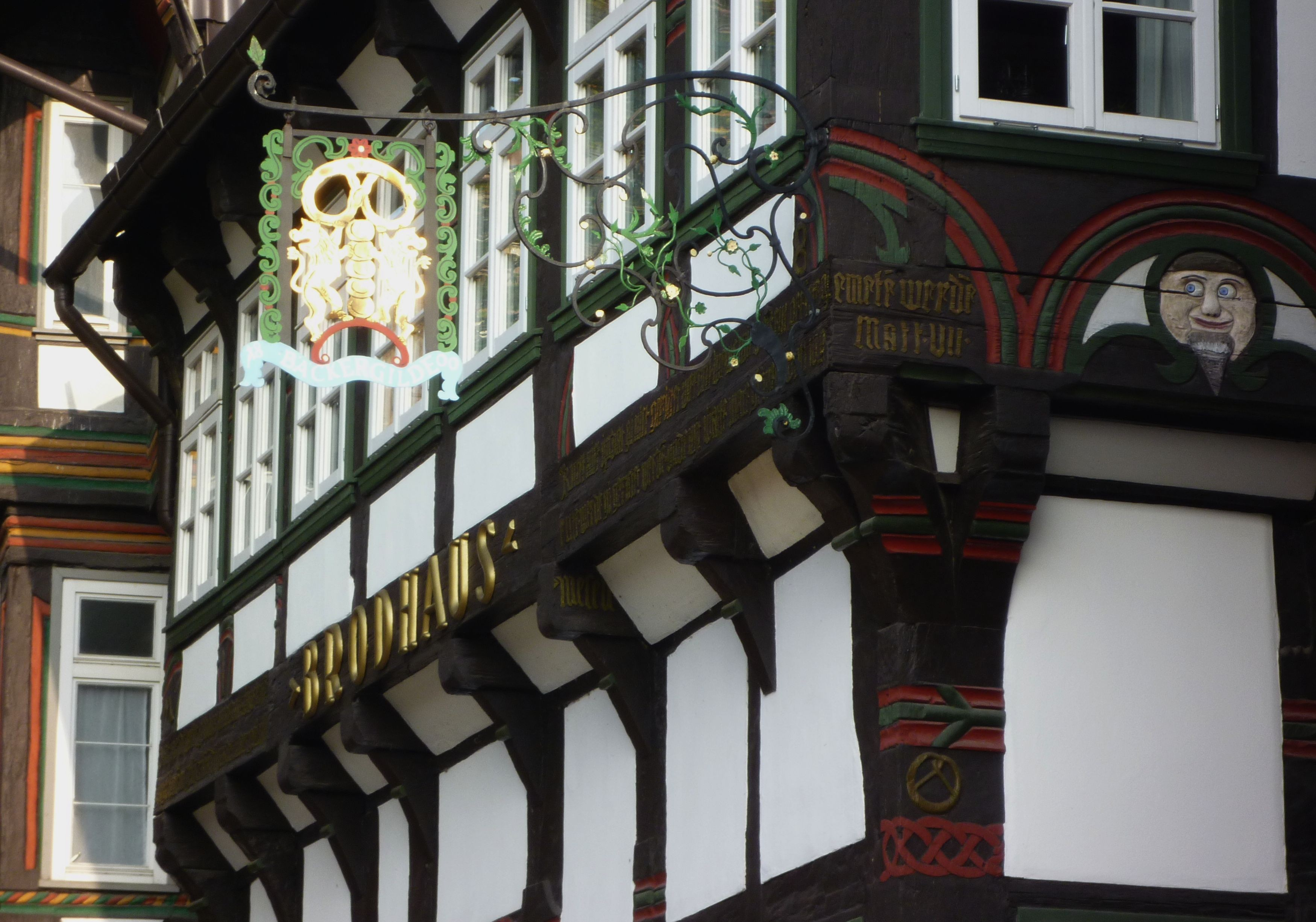 Einbeck - Gasthausschild des Brodhaus, 1540-1600 Fachwerk